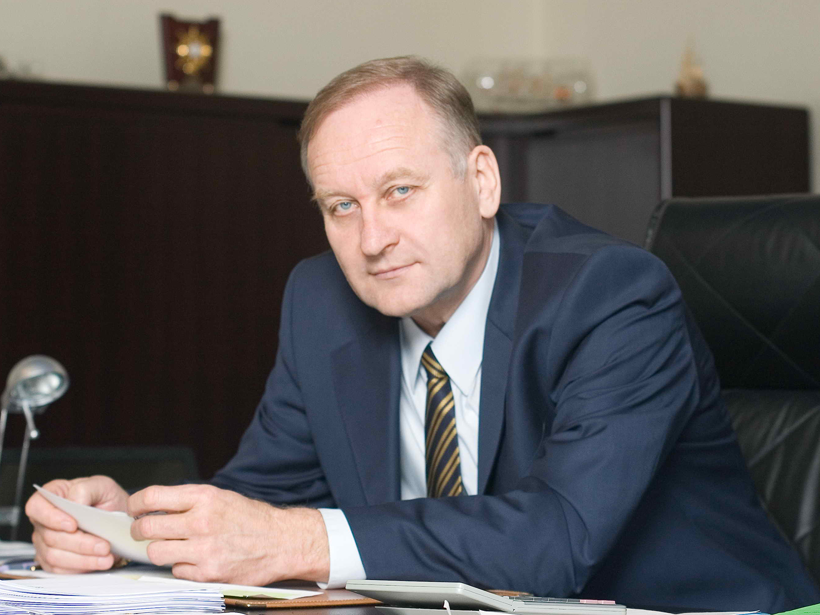 Президент ВГУЭС - Г.И. Лазарев